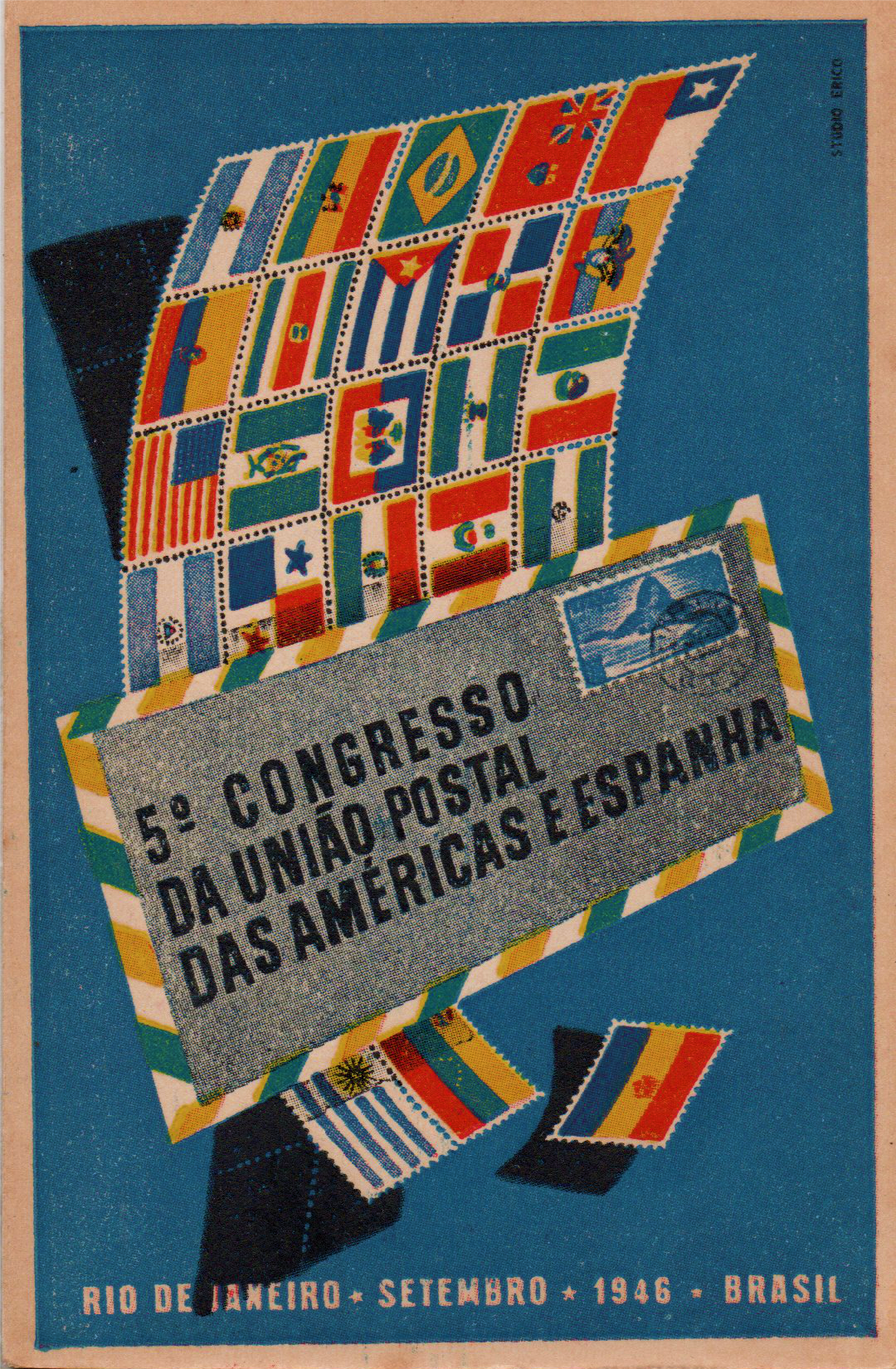 Cartão postal brasileiro de 1946 sobre o Quinto Congresso da União Postal das Américas e Espanha